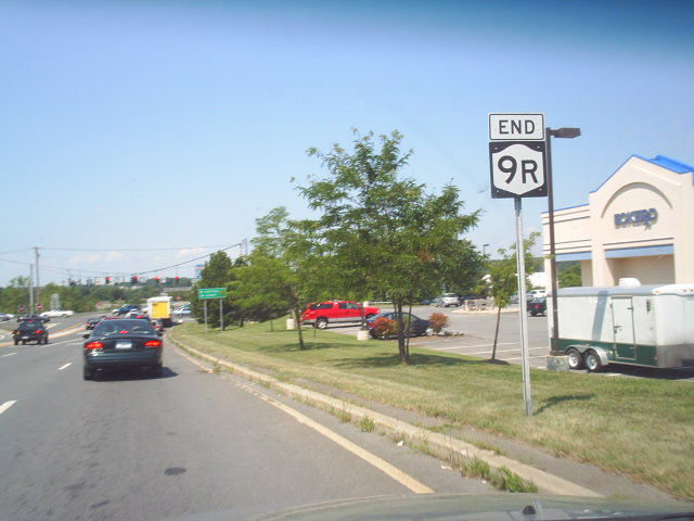 M3367S-4504